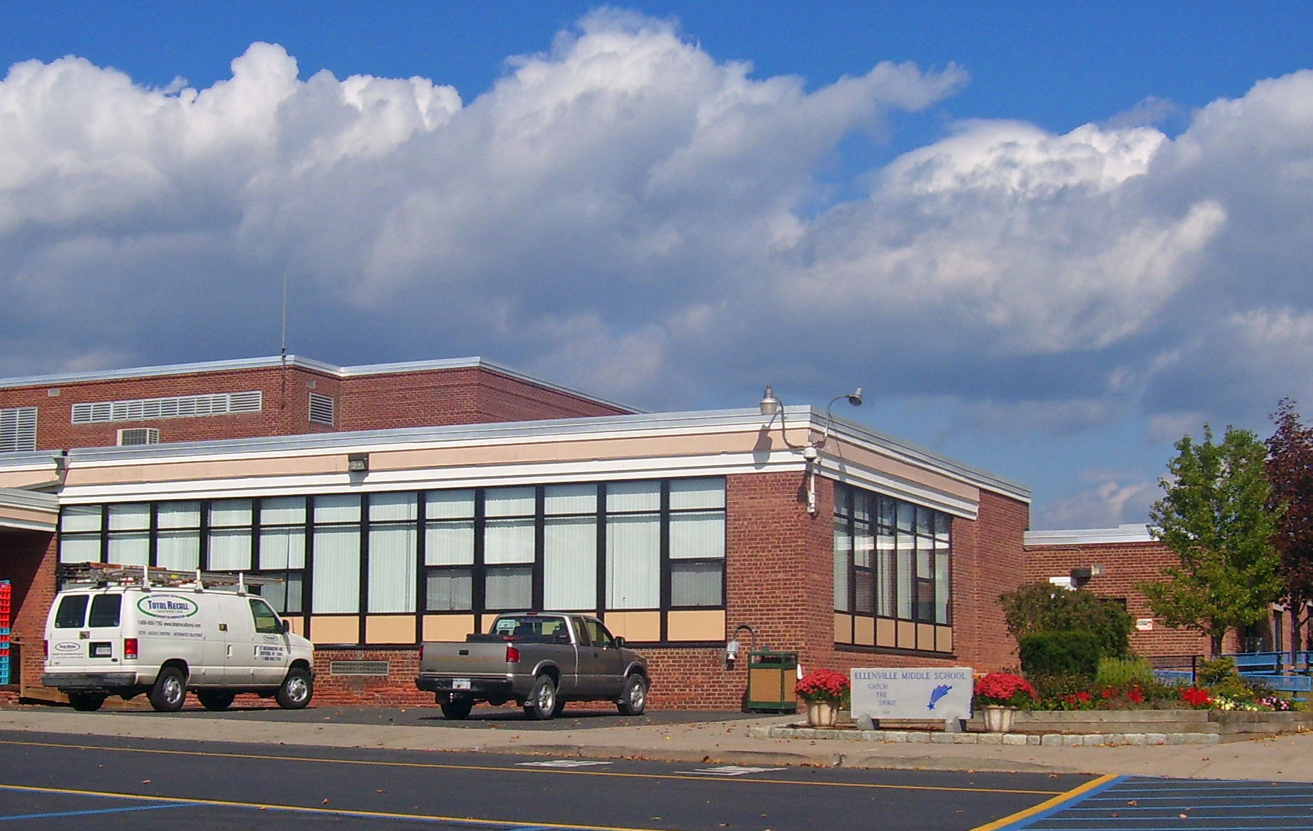 Ellenville Middle School, Ellenville, NY, USA